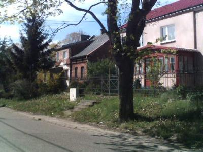 Ulica Stężycka w Szadółkach.